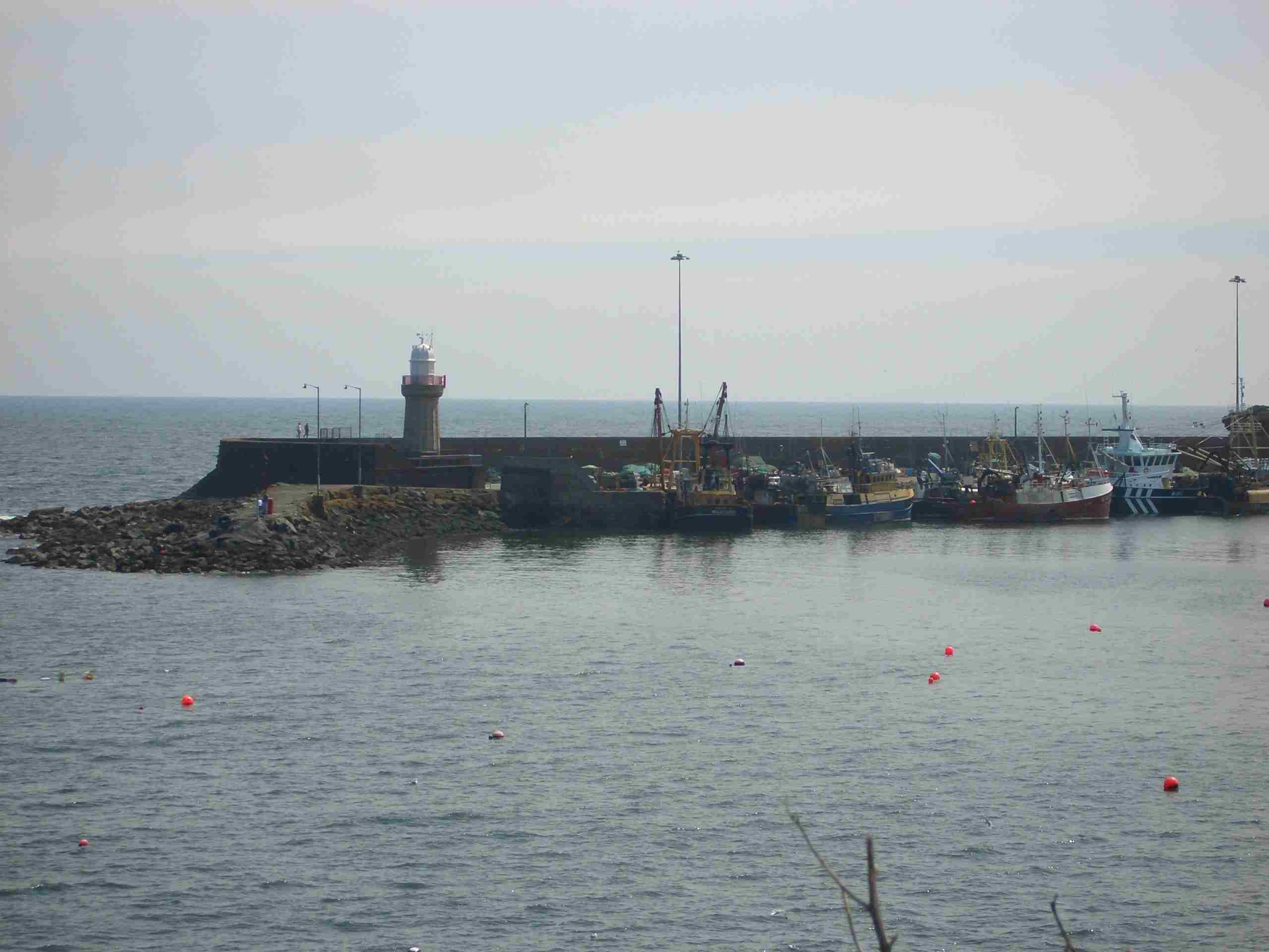 Dunmore East Hafen